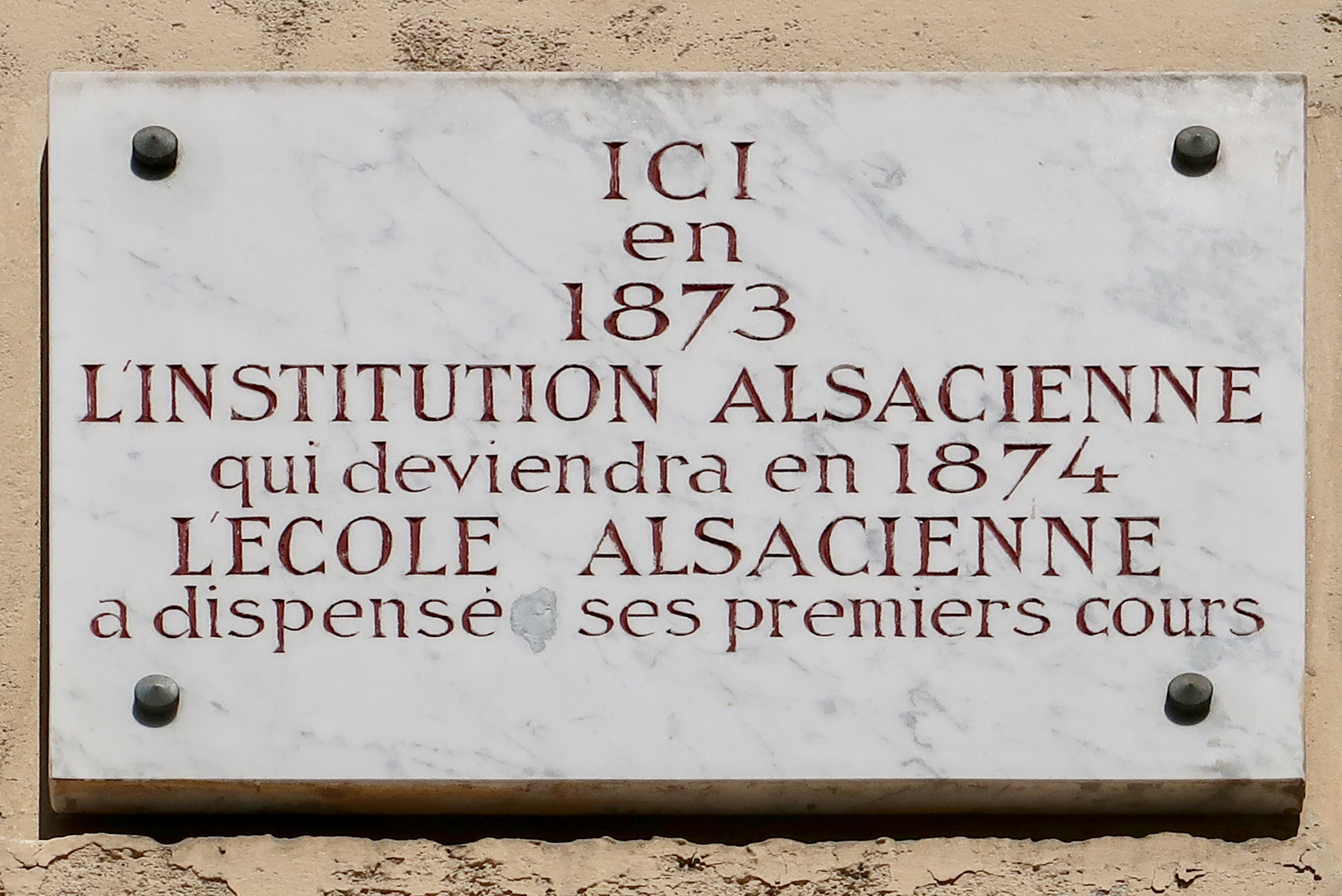 Plaque rappelant qu'il s'agissait du premier local de l'École alsacienne, 36 rue des Écoles (Paris, 5e).